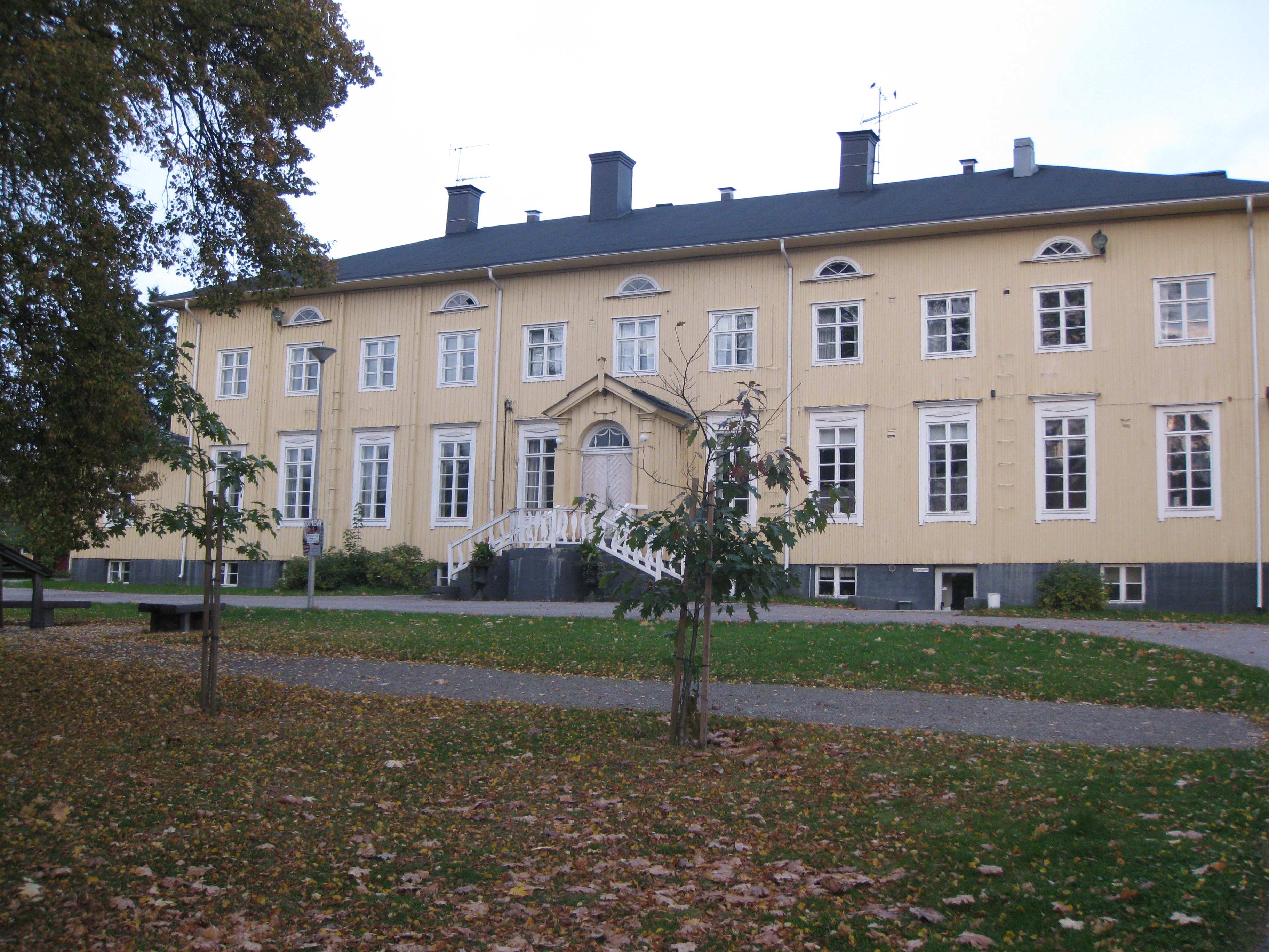 Kuva Itä-Hämeen opistosta Hartolassa, Päijät-Hämeessä.